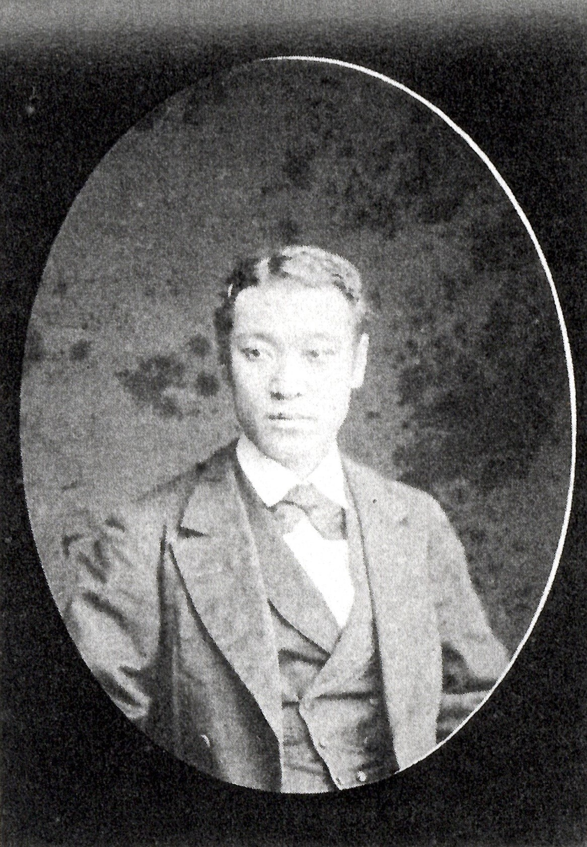 野宮定穀の肖像写真。